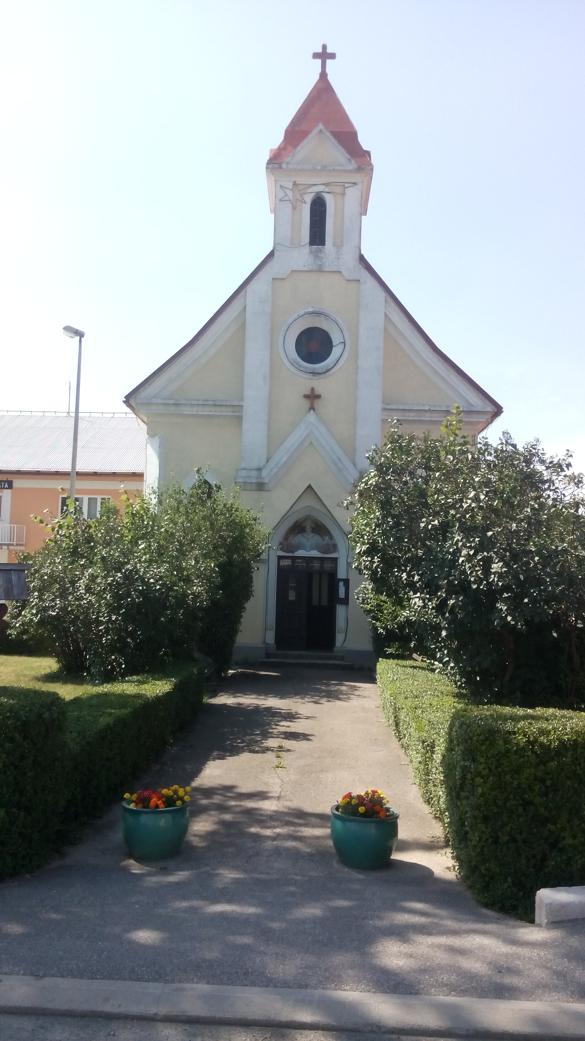 La preĝejo de Nia Sinjorino de Lourdes en Vrata, komunumo Fužine, Kroatio.